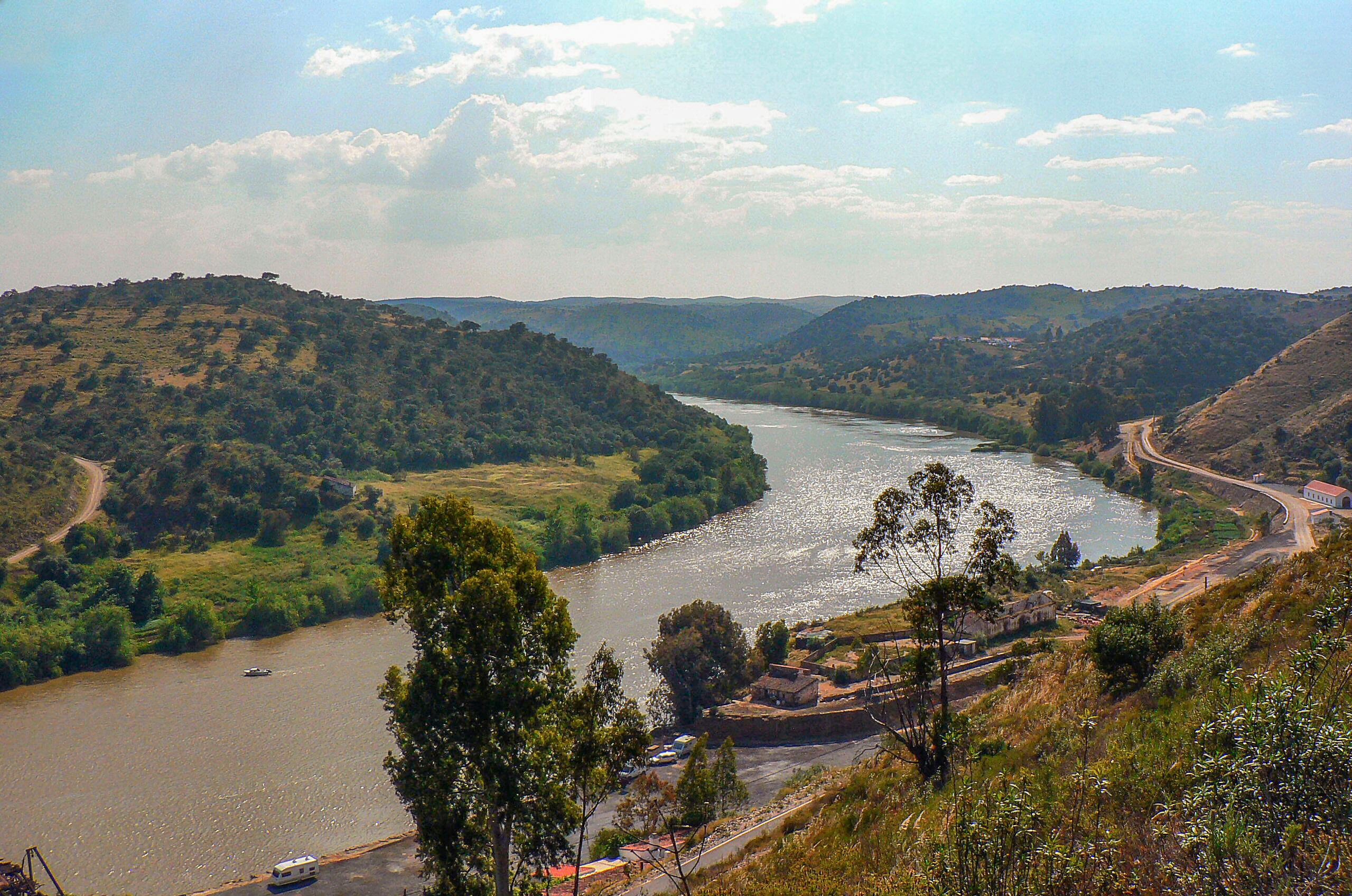 Vista do Rio Guadiana no Pomarão